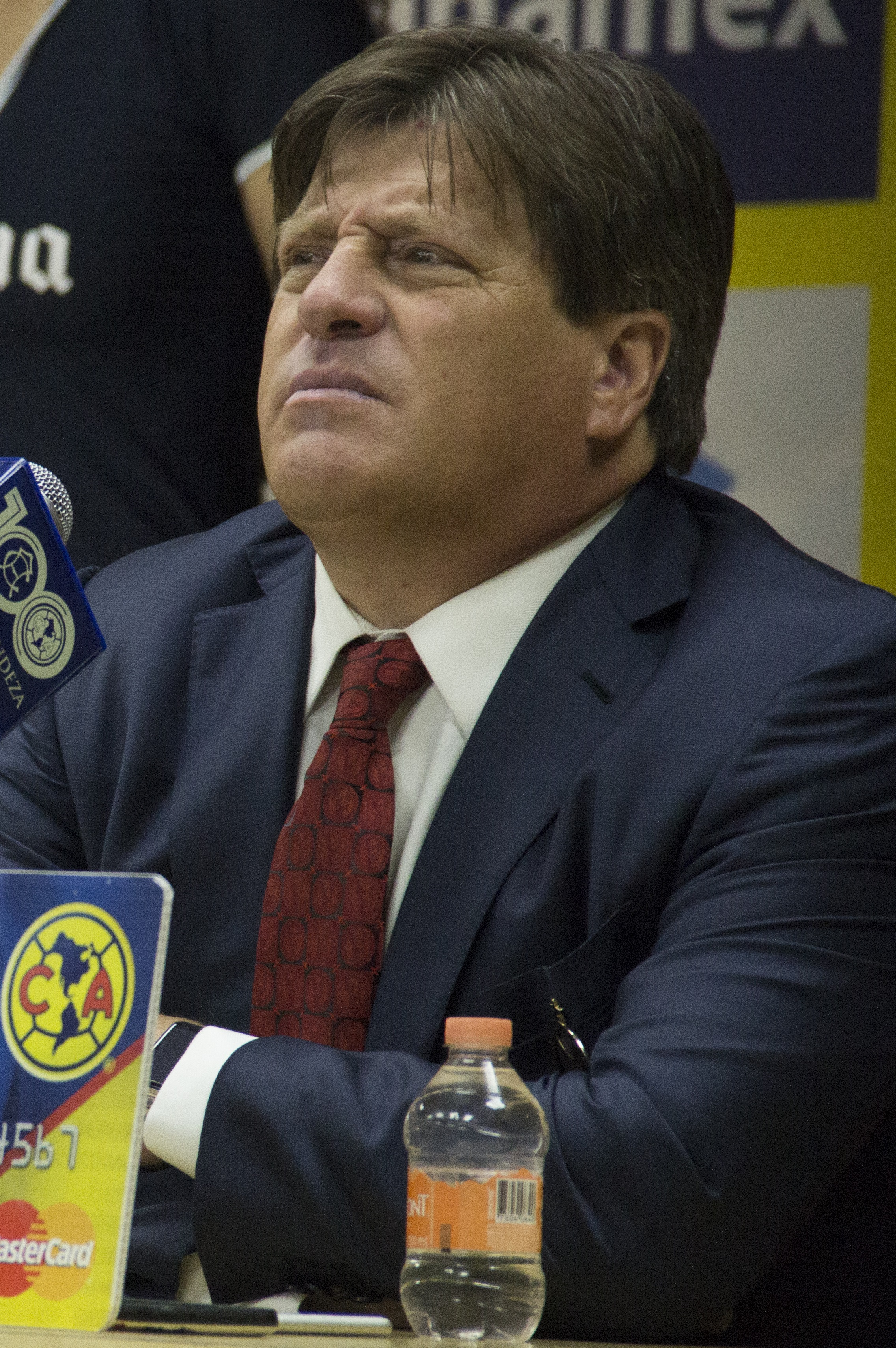 Miguel Herrera en conferencia de prensa.